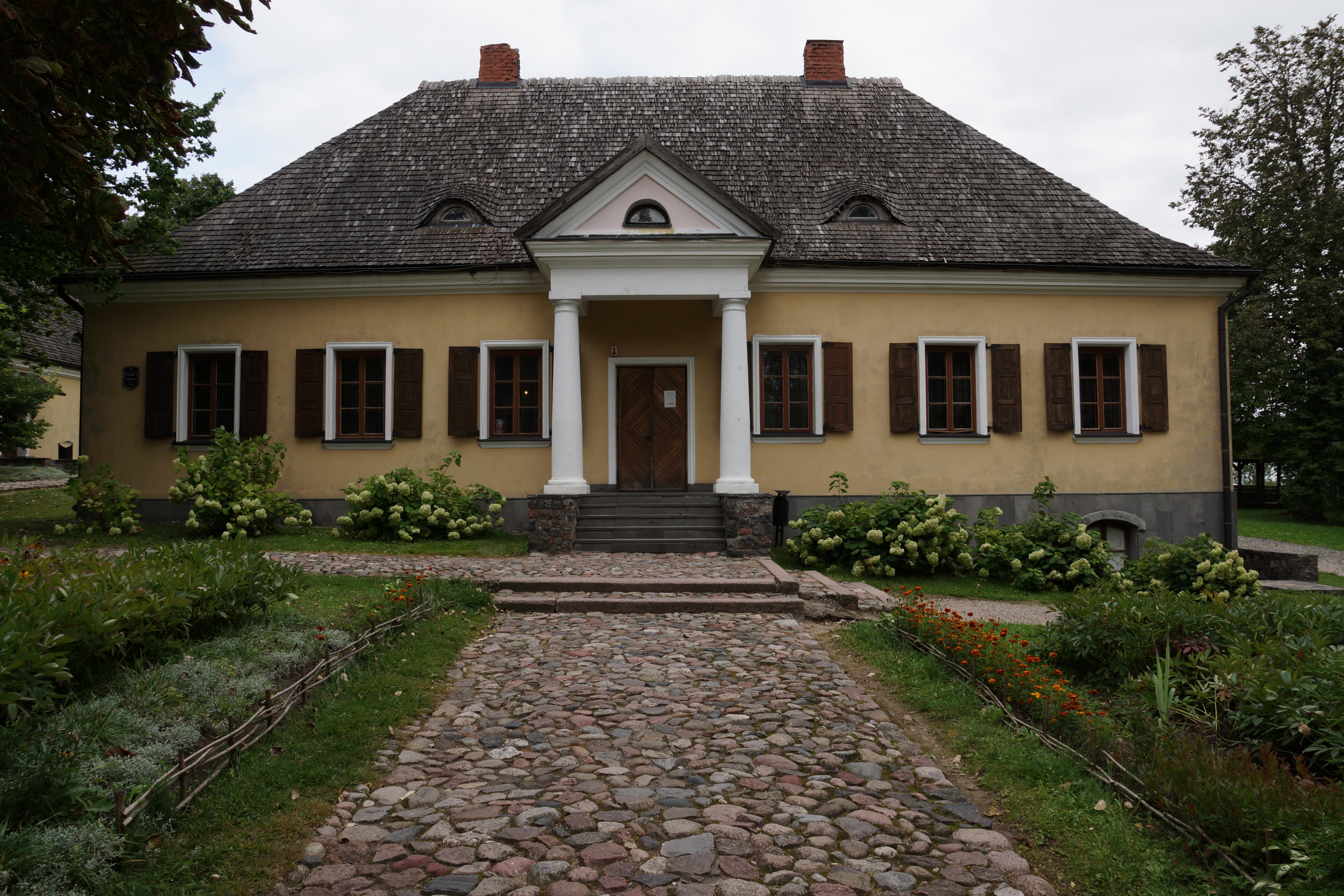 Беларуская (тарашкевіца): Былая сядзіба Міцкевічаў. г. Наваградак This is a photo of Belarusian heritage monument. Reference number: 411Г000408 ( WLM)